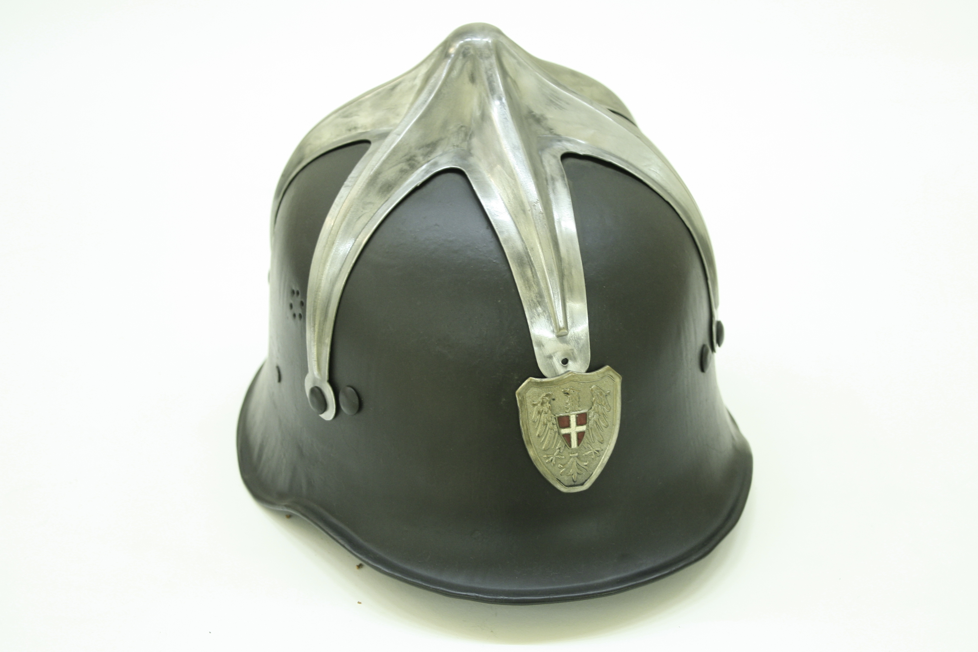 Helm der Feuerpolizei in Wien 1939-1945 im Feuerwehrmuseum Perchtoldsdorf in Niederösterreich